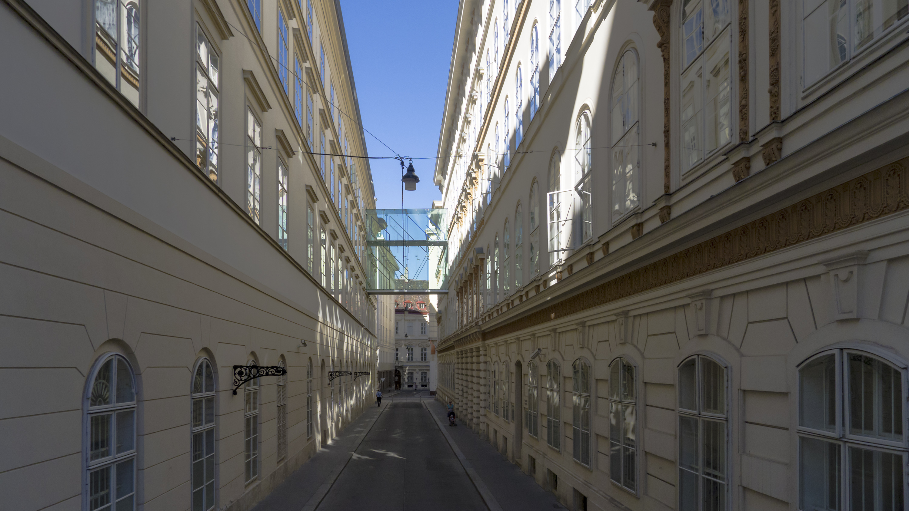 Leopold-Figl-Gasse in Wien 1 beim Minoritenplatz Richtung Nordosten